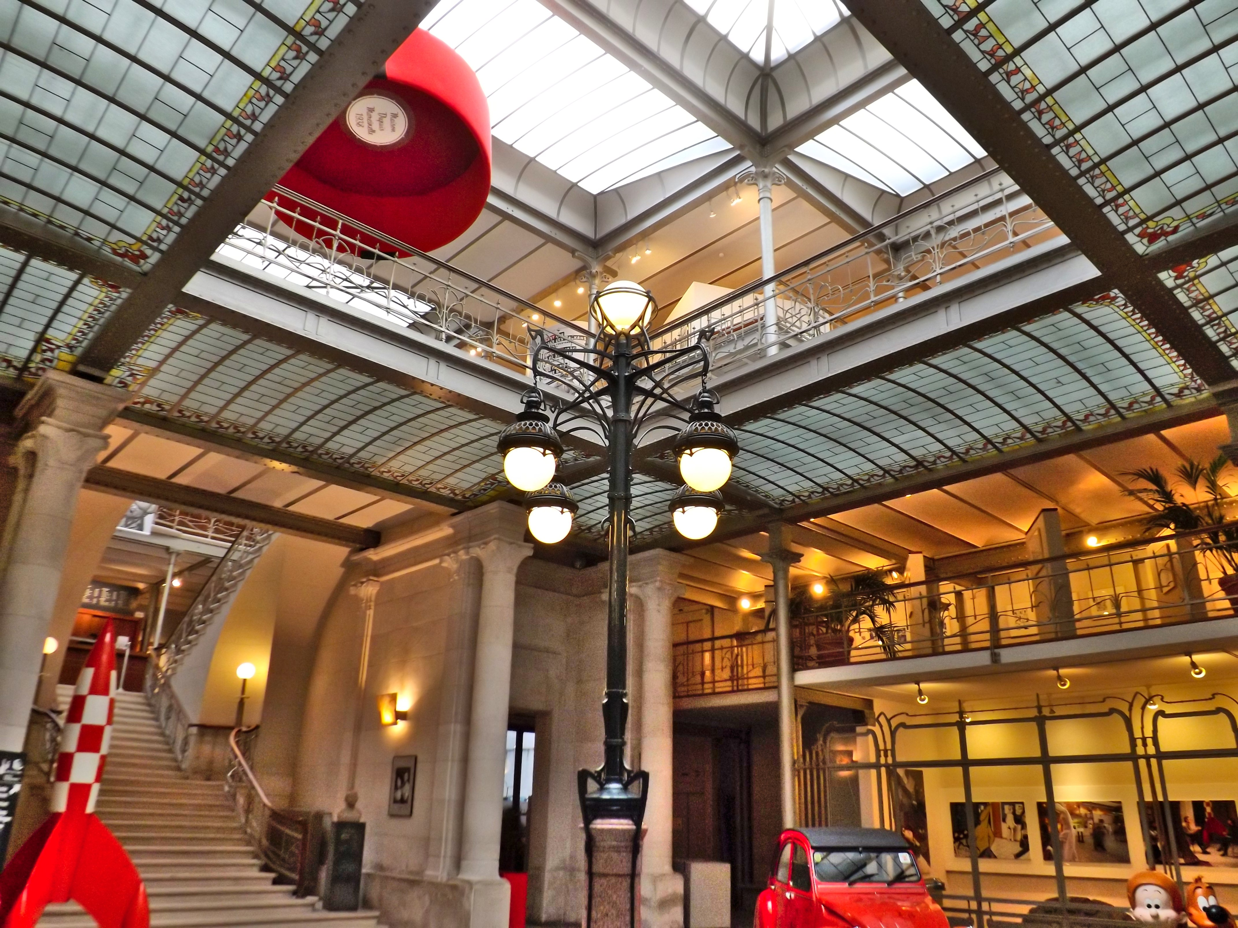 Hall d'entrée du centre belge de la bande dessinée. Photo prise avant l'ouverture au public du centre.